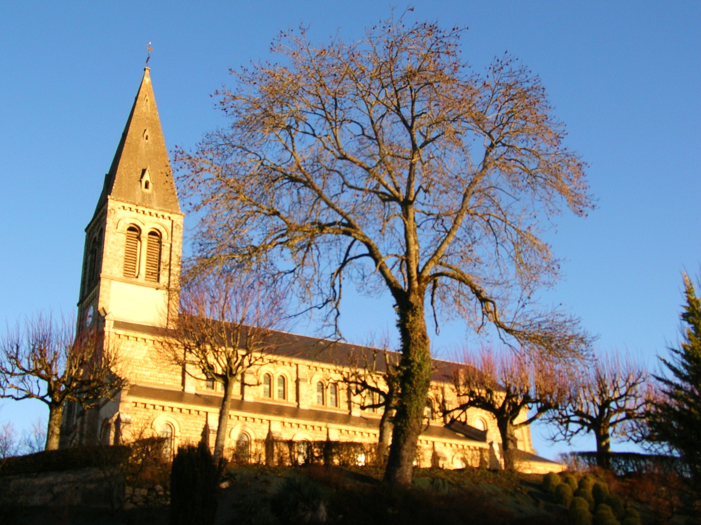 Vaste église construite sur le lieu d'un ancien prieuré. Elle domine tout le Bourg, notamment la mairie et l'école.